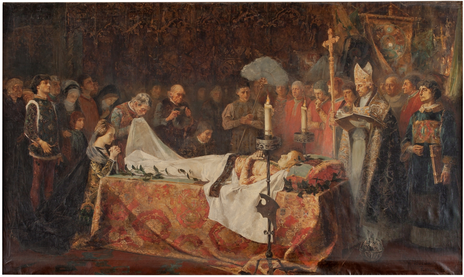 Representación de la muerte de Carlos de Viana (1421-1461), príncipe de Viana y primogénito del rey Juan II de Aragón y de Blanca de Navarra, por tanto, heredero al trono de ambos reinos. La escena representa el momento de los preparativos del cadáver en el Salón Real del palacio de Barcelona.